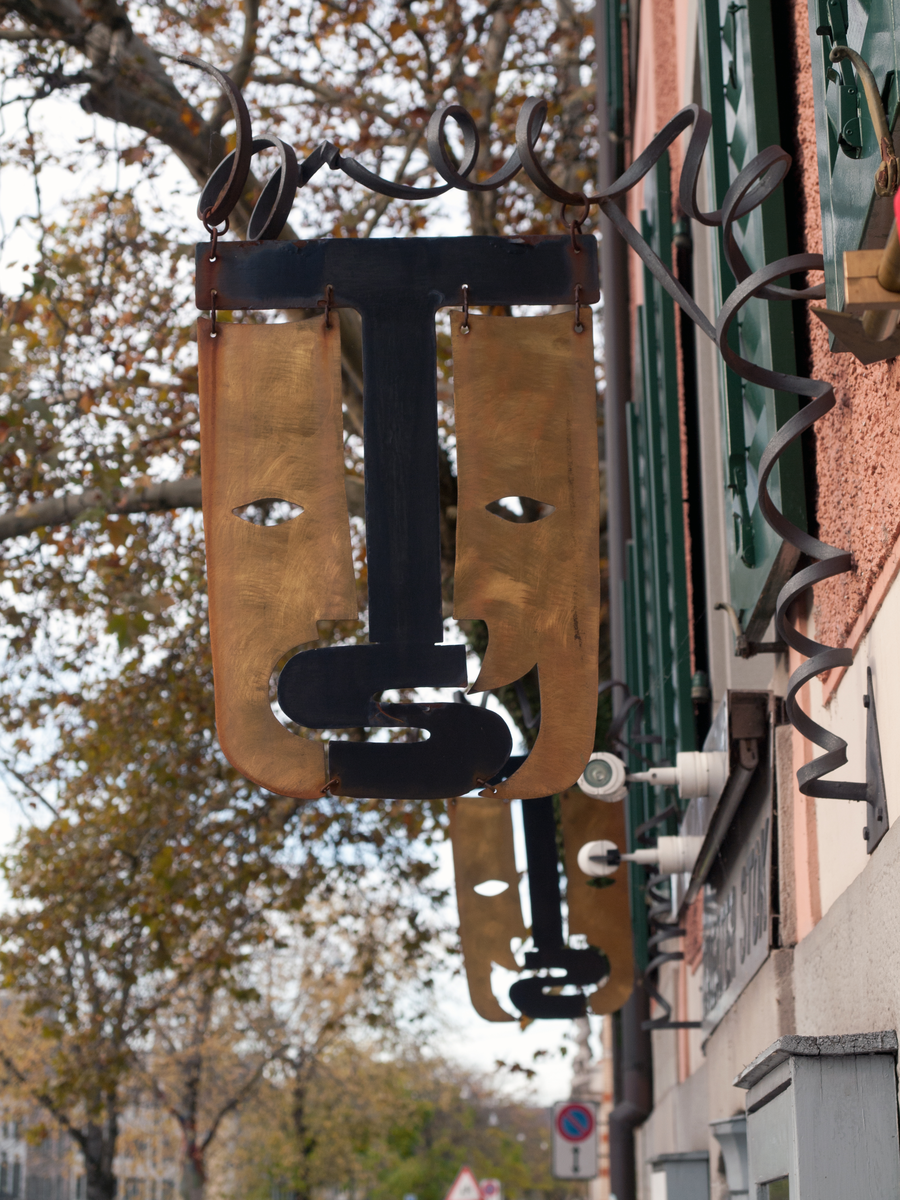 Schild am Eingang des Theater Stock. Nach einem Entwurf von Erica Hänssler. Anfertigung des Schild durch Hubert Daniel Doppelfeld, die der Aufhängnug durch Moritz Lindnmeyer.